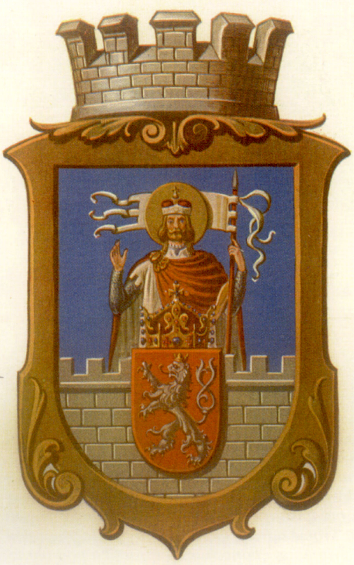 Znak Staré Boleslavi